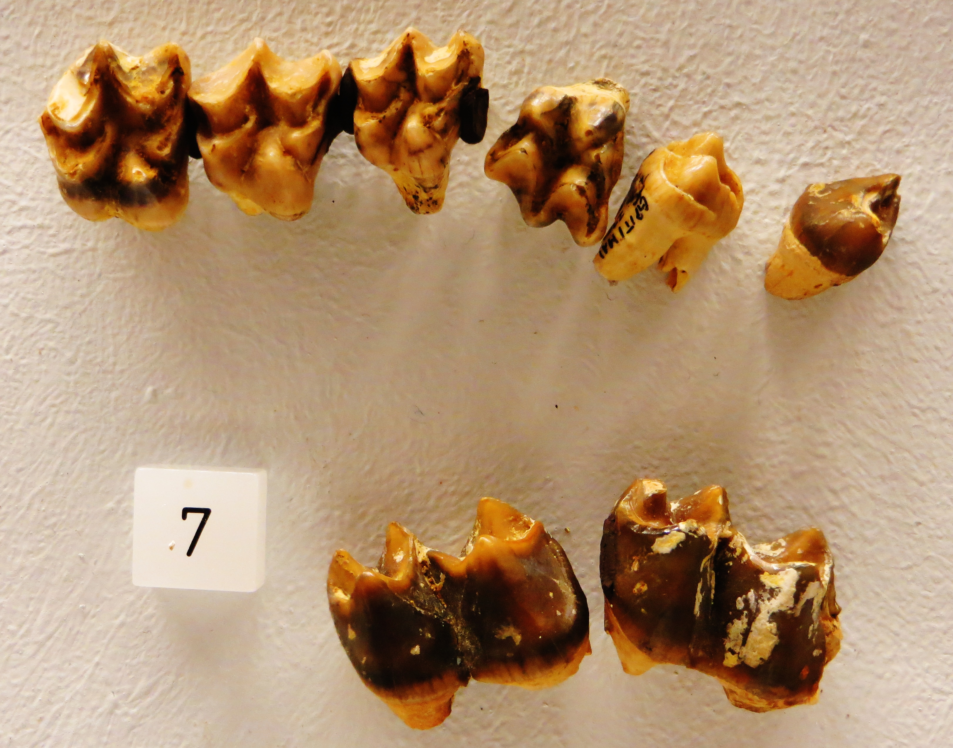 Fossil of Diplobune, an extinct mammal - Took the picture at Museum of Paleontology, Tuebingen